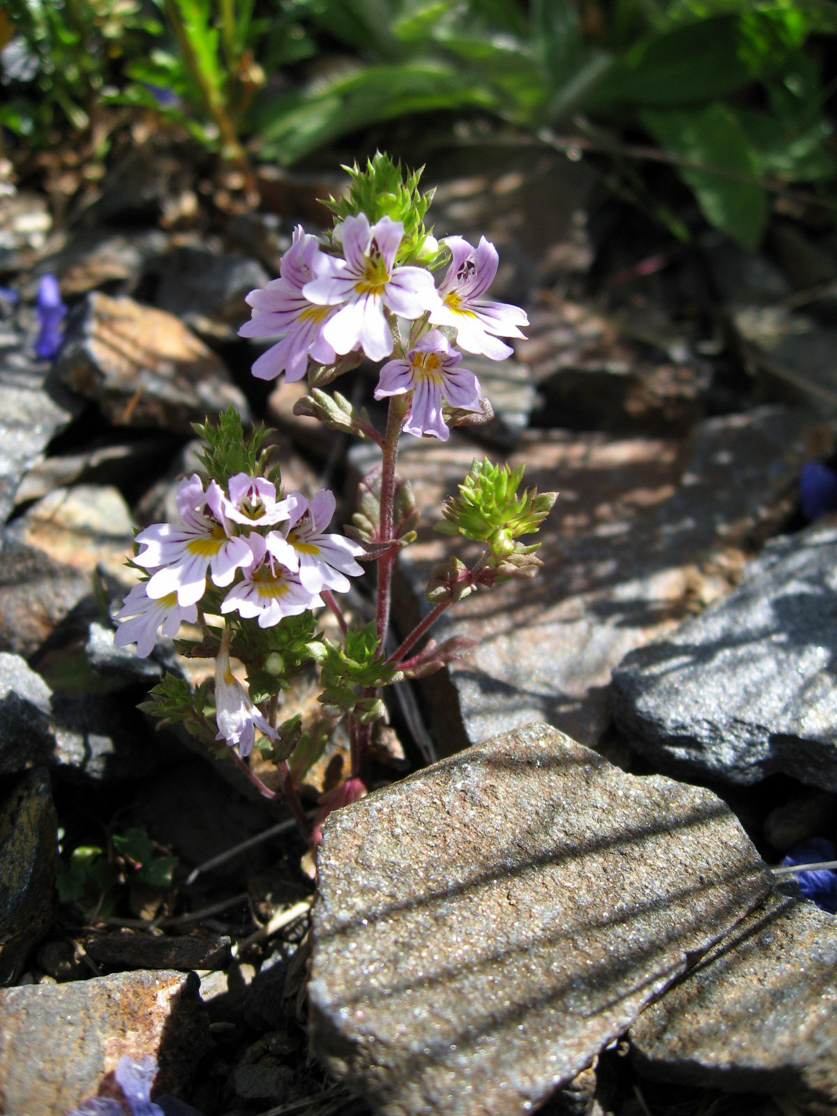 Salzburger Augentrost (Euphrasia salisburgensis)